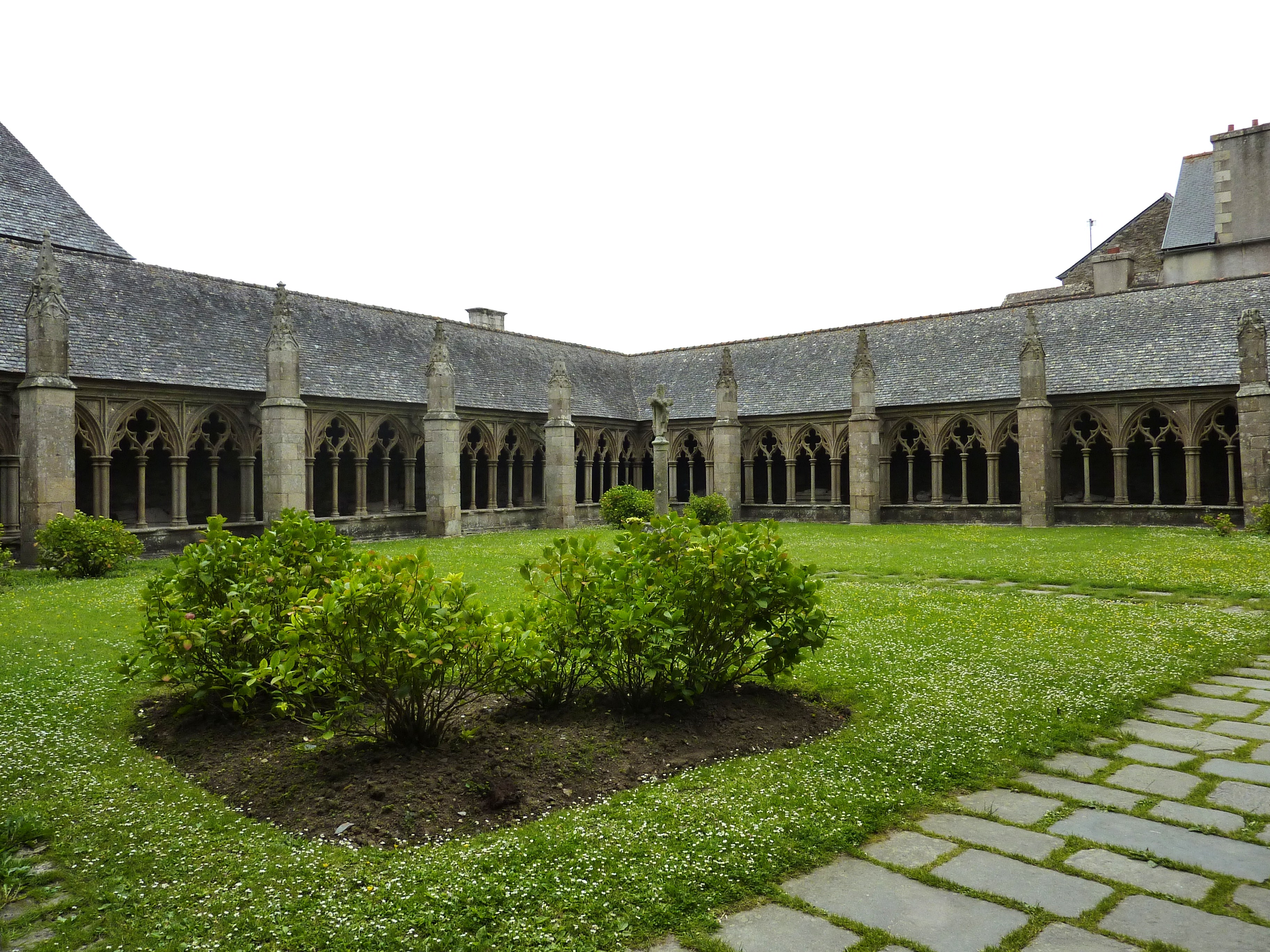 Tréguier : le cloître jouxtant la cathédrale Saint-Tugdual. Ailes nord et est.